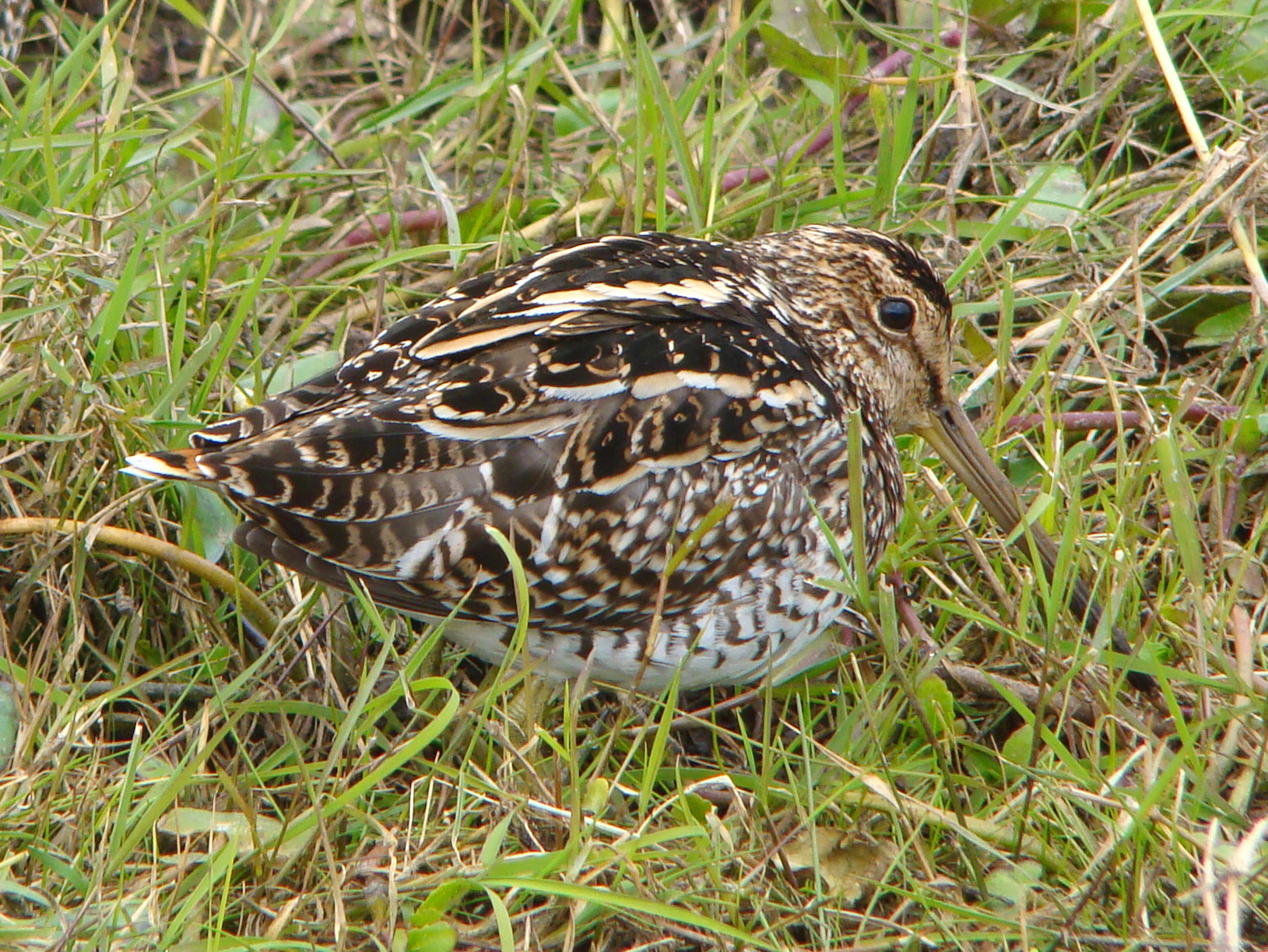 Gallinago paraguaiae paraguaiae photographed in Rio Grande, Rio Grande do Sul, Brazil, in June 2009.